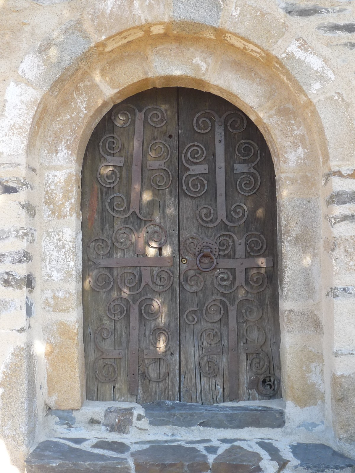 Eglise de Jujols, Pyrénées-Orientales, France